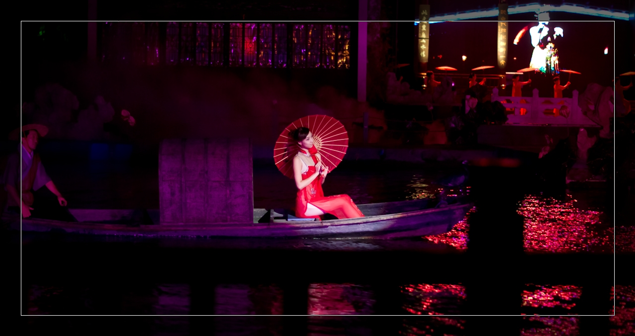 2010-7-24拍摄于白鹭洲，夜泊秦淮演出片段